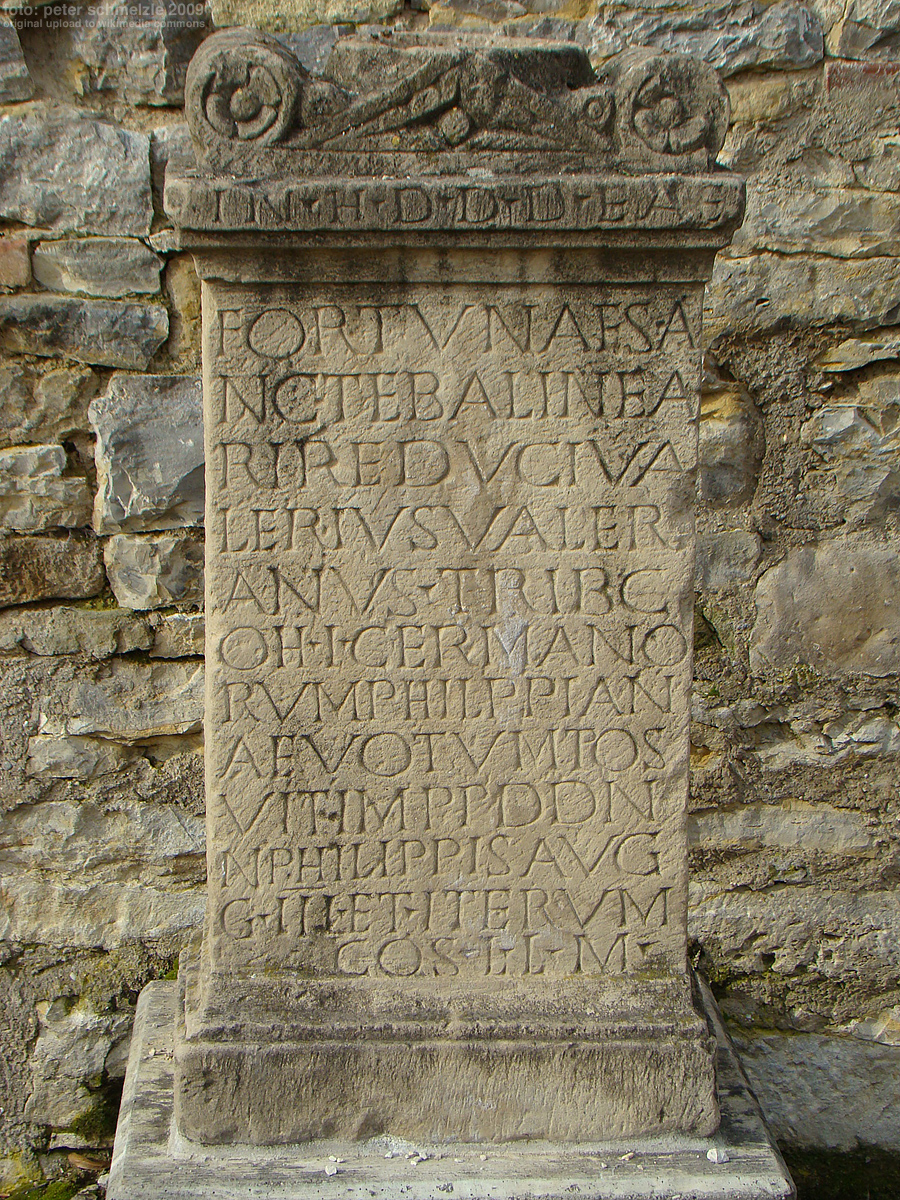 Weihestein für Fortuna, die Beschützerin des Bades. Aufgestellt von Valerius Valerianus, dem Tribunus cohortis der Jagsthausener Einheit. Aufgestellt 248 n. Chr. im kleinen Bad (CIL,13,6552). Kopie im Römerbad Jagsthausen.